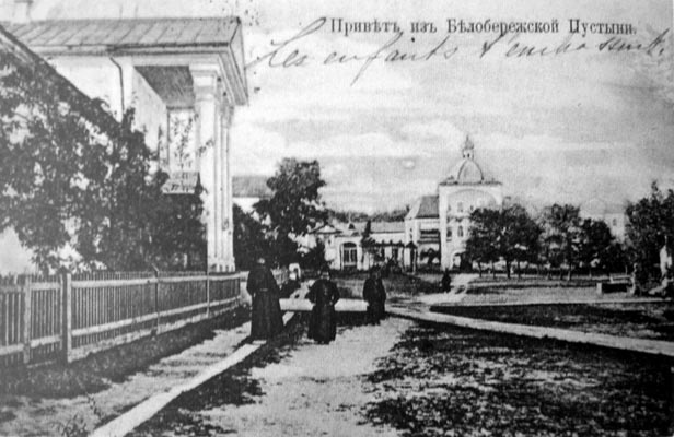 Молодые монахи Белобережской пустыни (со старинной открытки)